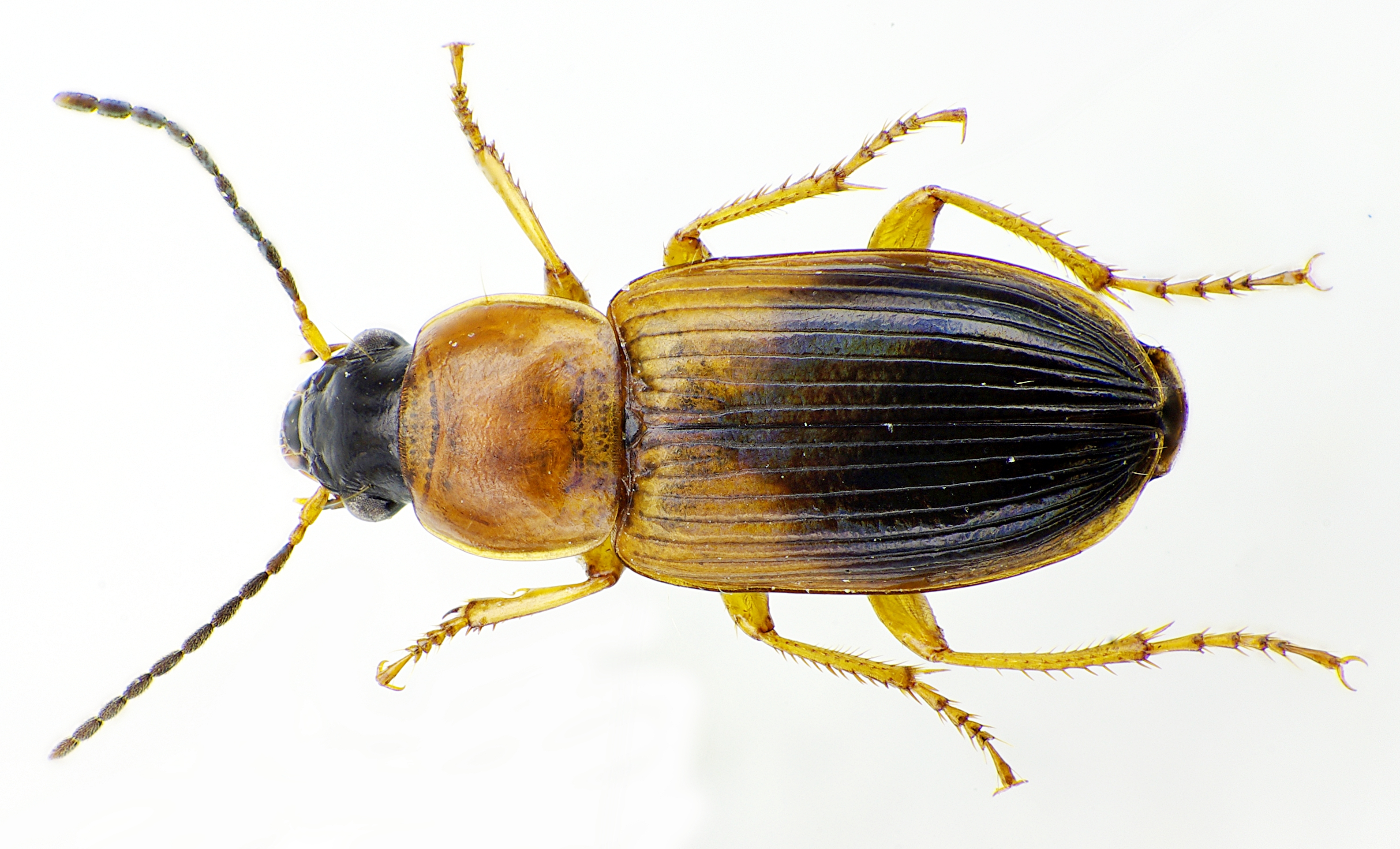 Stenolophus teutonus, Aufsicht